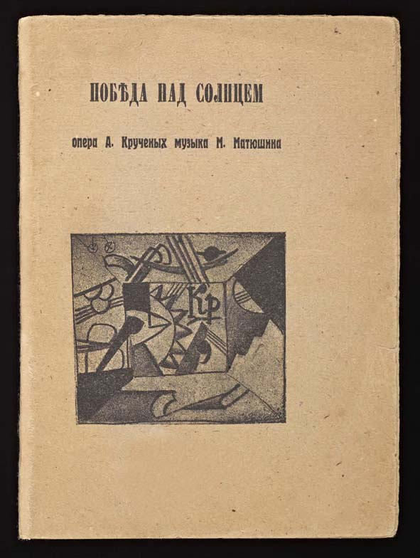 Cover "Victory over the Sun". КРУЧЕНЫХ А. Победа над солнцем. Опера А. Крученых. Пролог В. Хлебникова. Музыка М. Матюшина. [СПб., Свет, 1913]. Обложка по рисункам К. Малевича и Д. Бурлюка. [Тираж 1.000 экз.]